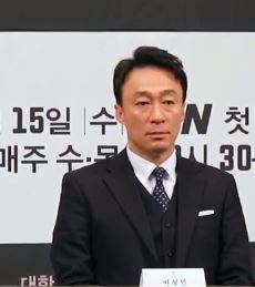 1월 8일 오후 서울시 강남구 논현동 임피리얼 팰리스 서울에서 tvN 새 수목드라마 '머니게임'의 제작발표회가 열려 배우 심은경, 고수, 이성민이 참석해 기자 질의 응답 시간을 갖고 있다.